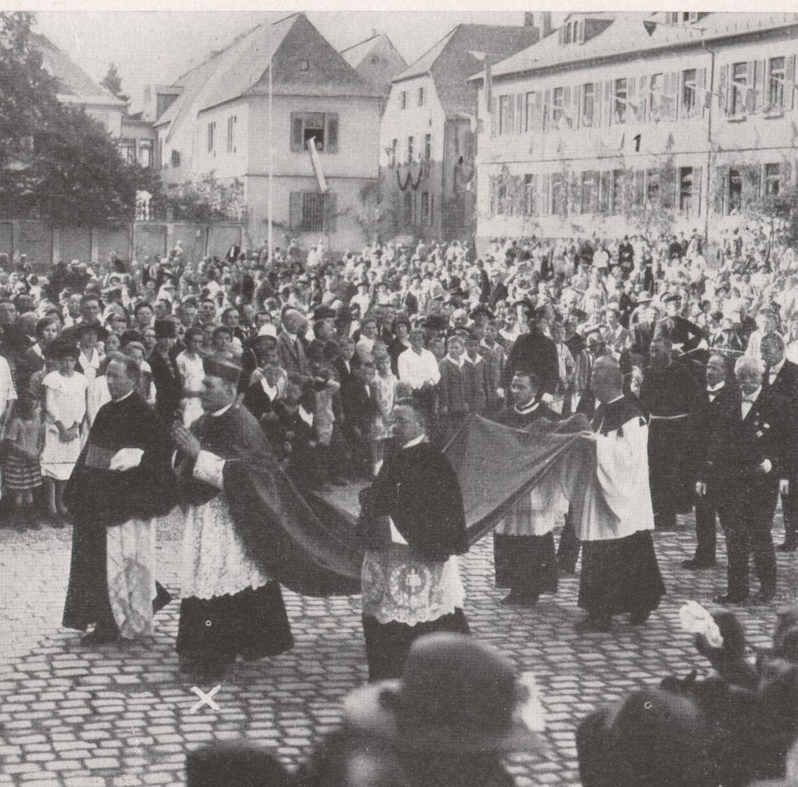 Dr. Lukas Grünenwald (rechter Bildrand mit mehreren Orden auf der Brust)